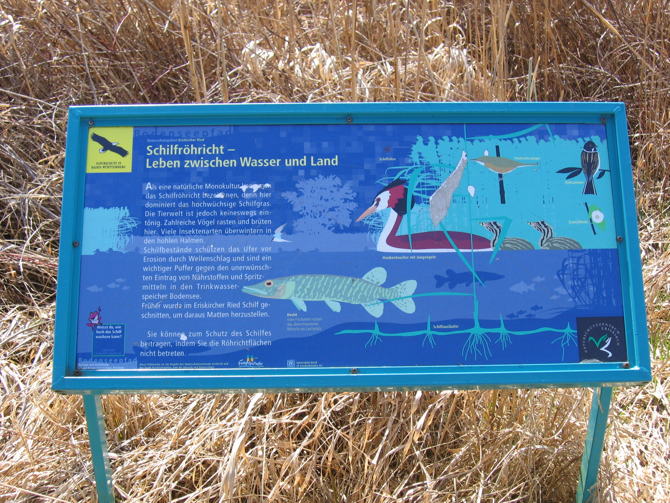 Bodenseepfad/Eriskircher Ried: Infotafel Schilfröhricht